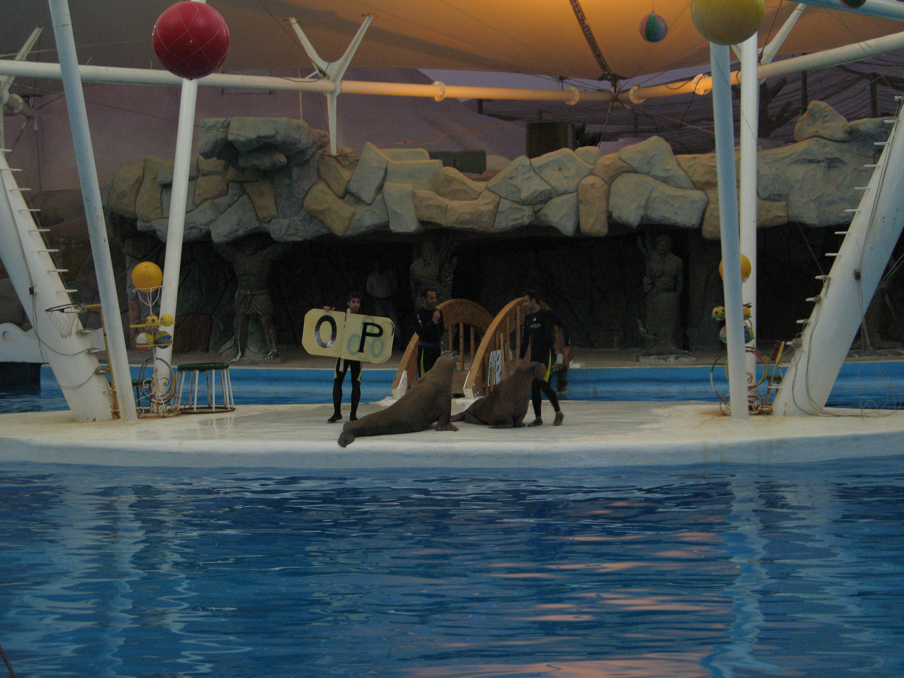 Iran